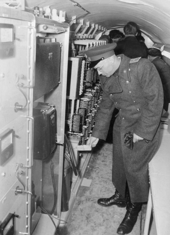 Zentralbild/Kollektiv 24.4.1956 USA-Spionage-Tunnel unter DDR-Gebiet Der amtierende Militärkommandant des sowjetischen Sektors von Berlin, Oberst Kozjuba, gab am Montagabend (23.4.1956) auf einer Pressekonferenz vor zahlreichen in- und ausländischen Journalisten bekannt, dass am 22.4.1956 von sowjetischen Truppen eine amerikanische Abhörzentrale im demokratischen Sektor Berlins ausgehoben wurde. Amerikanische Stellen hatten im Gebiet von Alt-Glienicke einen etwa 300 m langen Stollen angelegt, der zu den Fernmeldelinien der sowjetischen Truppen sowie zu den Fernmeldelinien der Deutschen Demokratischen Republik lief. Durch die Stollen ziehen sich Kabelleitungen, die vom amerikanischen Sektor ausgehen und an die Kabelleitungen der sowjetischen Truppen anschlossen wurde. Im Anschluß an die Pressekonferenz fand eine Besichtigung der anerikanischen Abhörzentrale statt. UBz. Ein Offizier der sowjetischen Streitkräfte in Deutschland macht auf die englische Beschriftung der Anlage im Stollen aufmerksam.